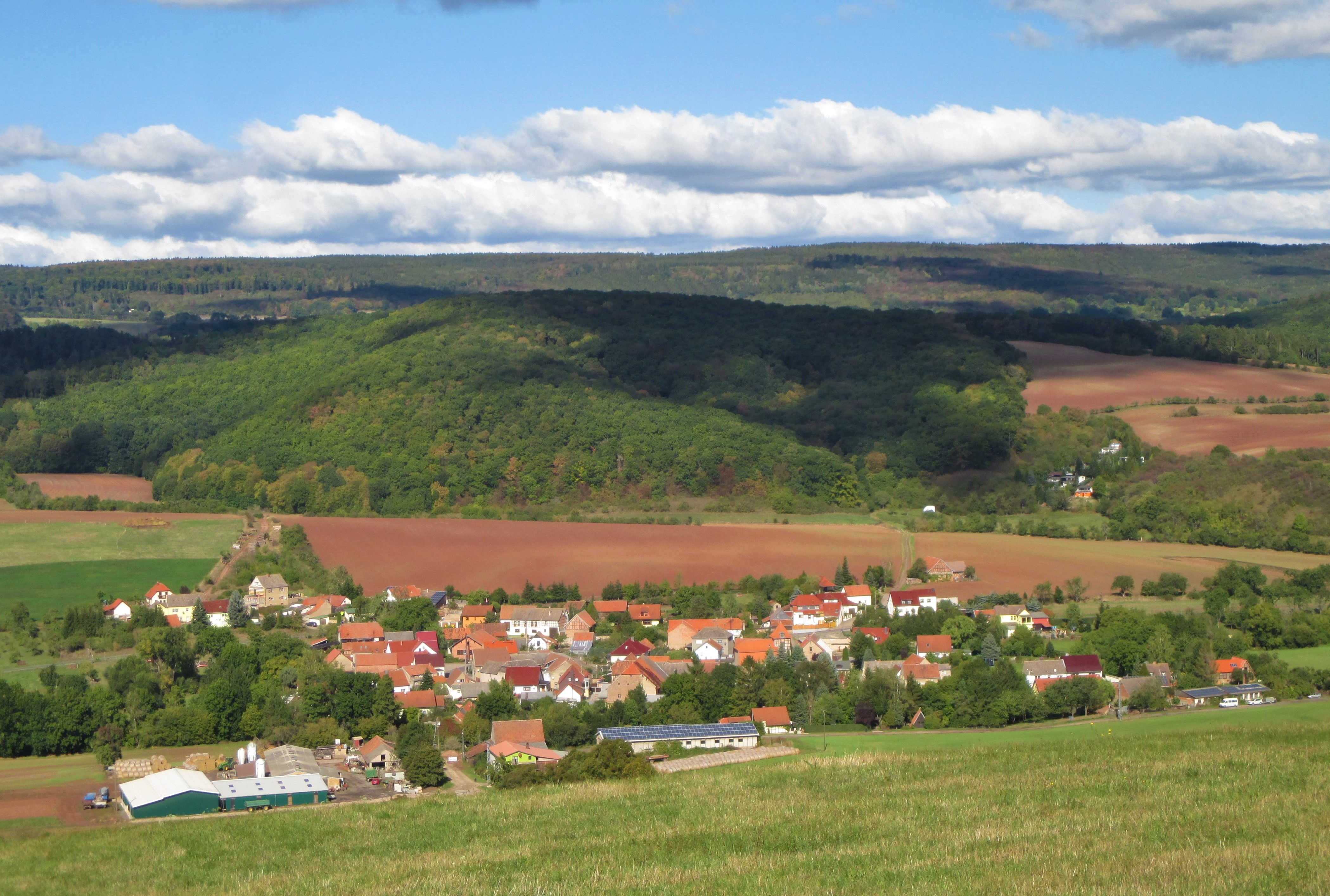 Blick von Süden auf Kleinleinungen, Gemeinde Südharz, Landkreis Mansfeld-Südharz